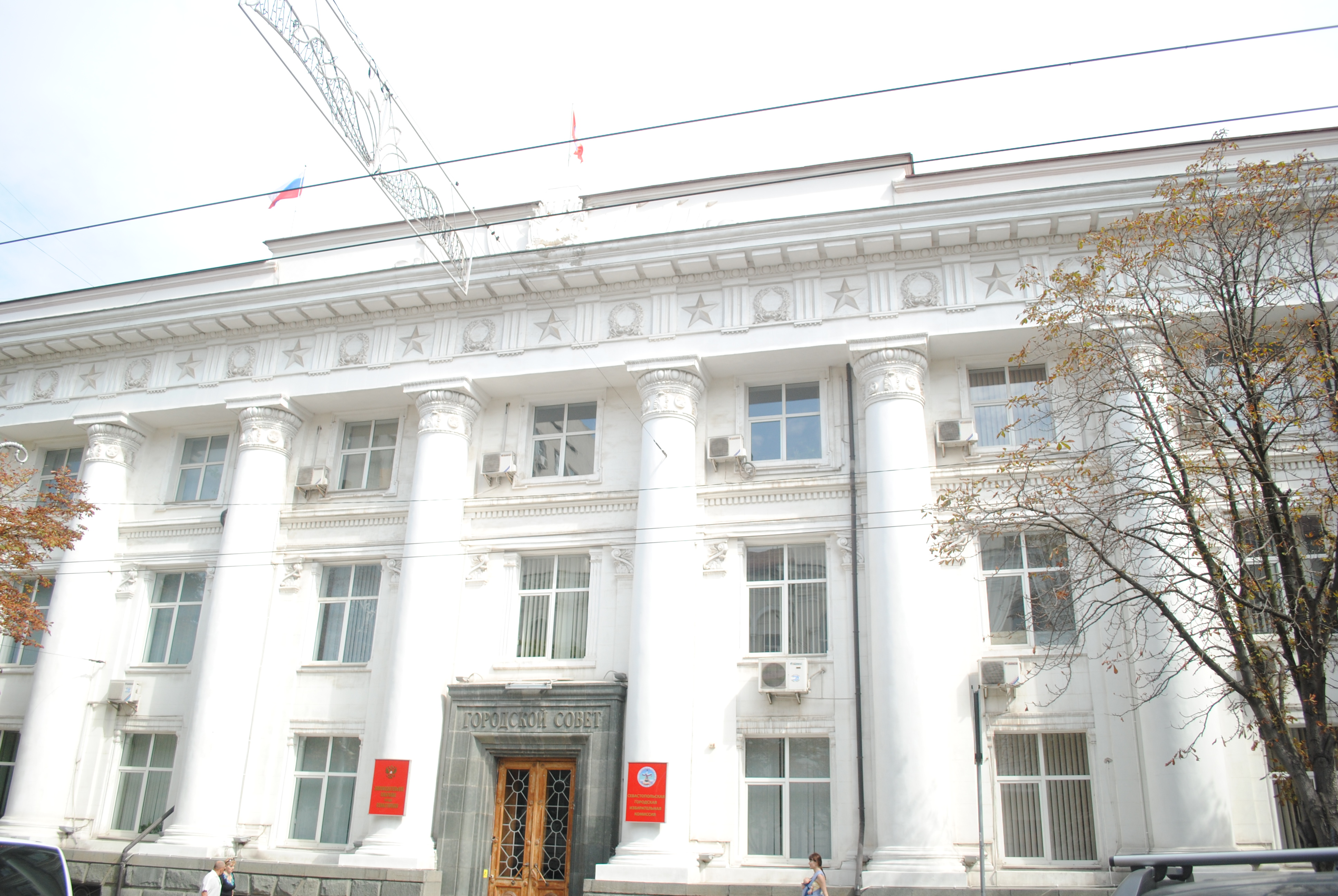 Административное здание: улица Ленина, 3, Ленинский район, Севастополь This object is located on the Crimean Peninsula and recognized as cultural heritage by both Russia and Ukraine under the monument ID: 9230141000/ 85-000-0009, respectively. The legal status of the Crimean region is currently disputed.